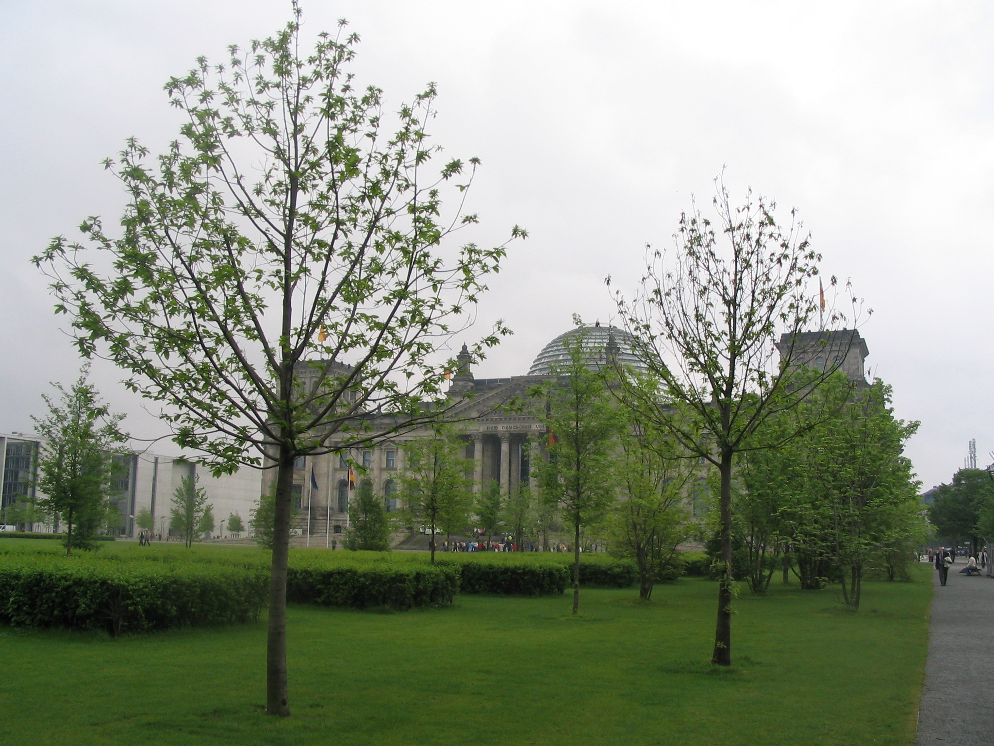 Rijksdag in Berlijn. Eigen werk.